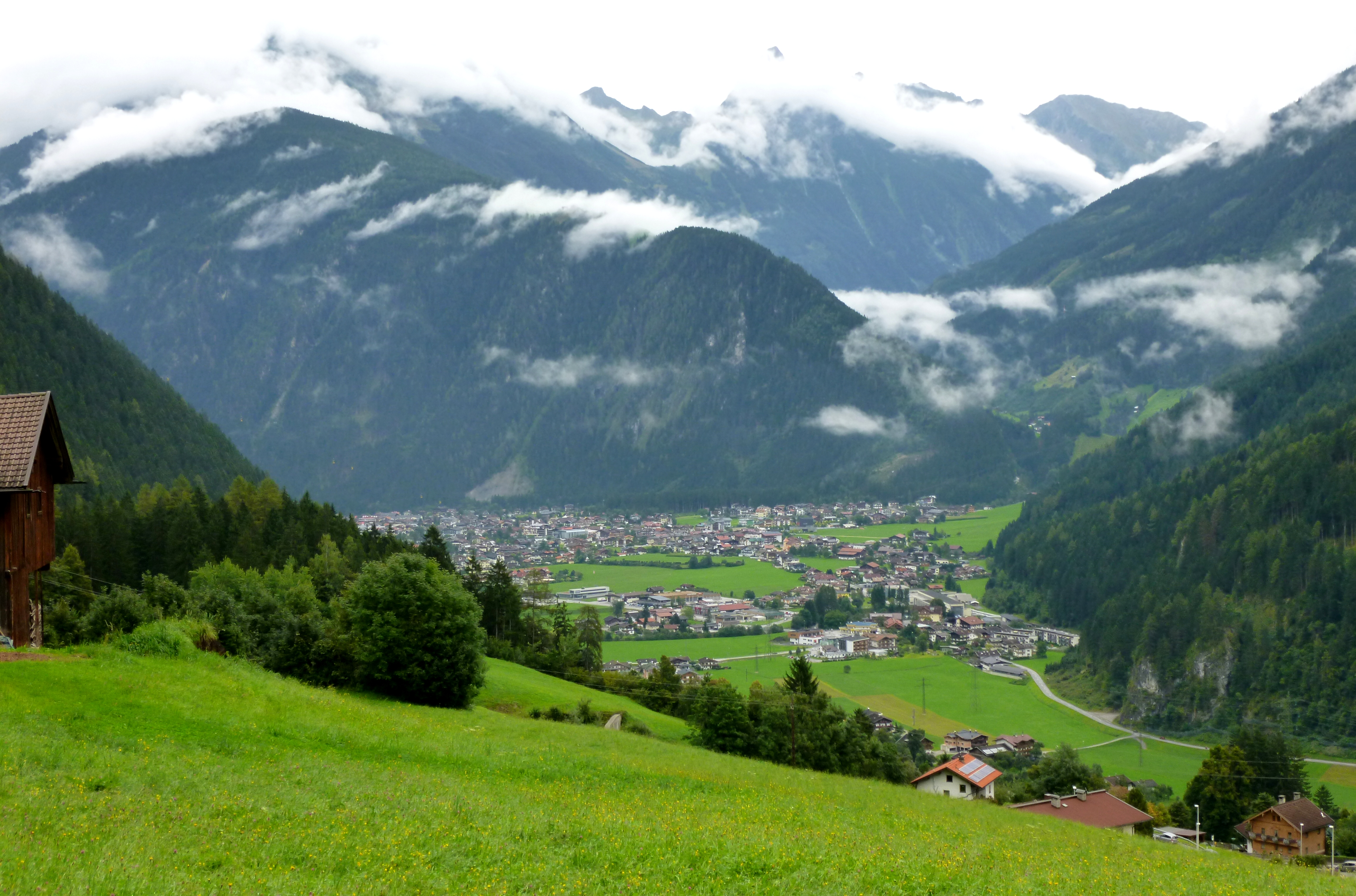 Mayrhofen im Zillertal (Tirol); aufgenommen von der Ortschaft Finkenberg, Blickrichtung nach Osten